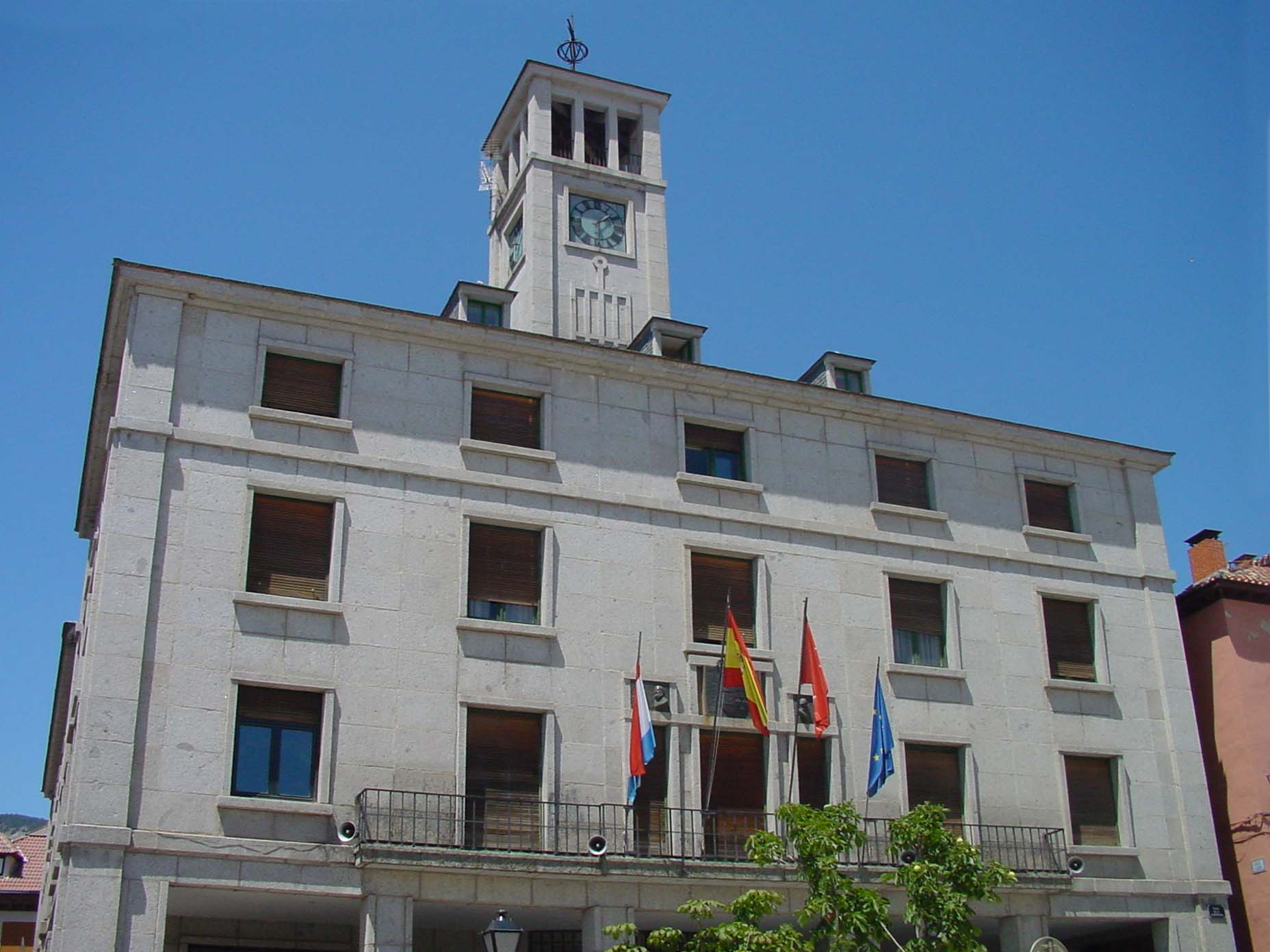 Ayuntamiento de San Lorenzo de El Escorial.